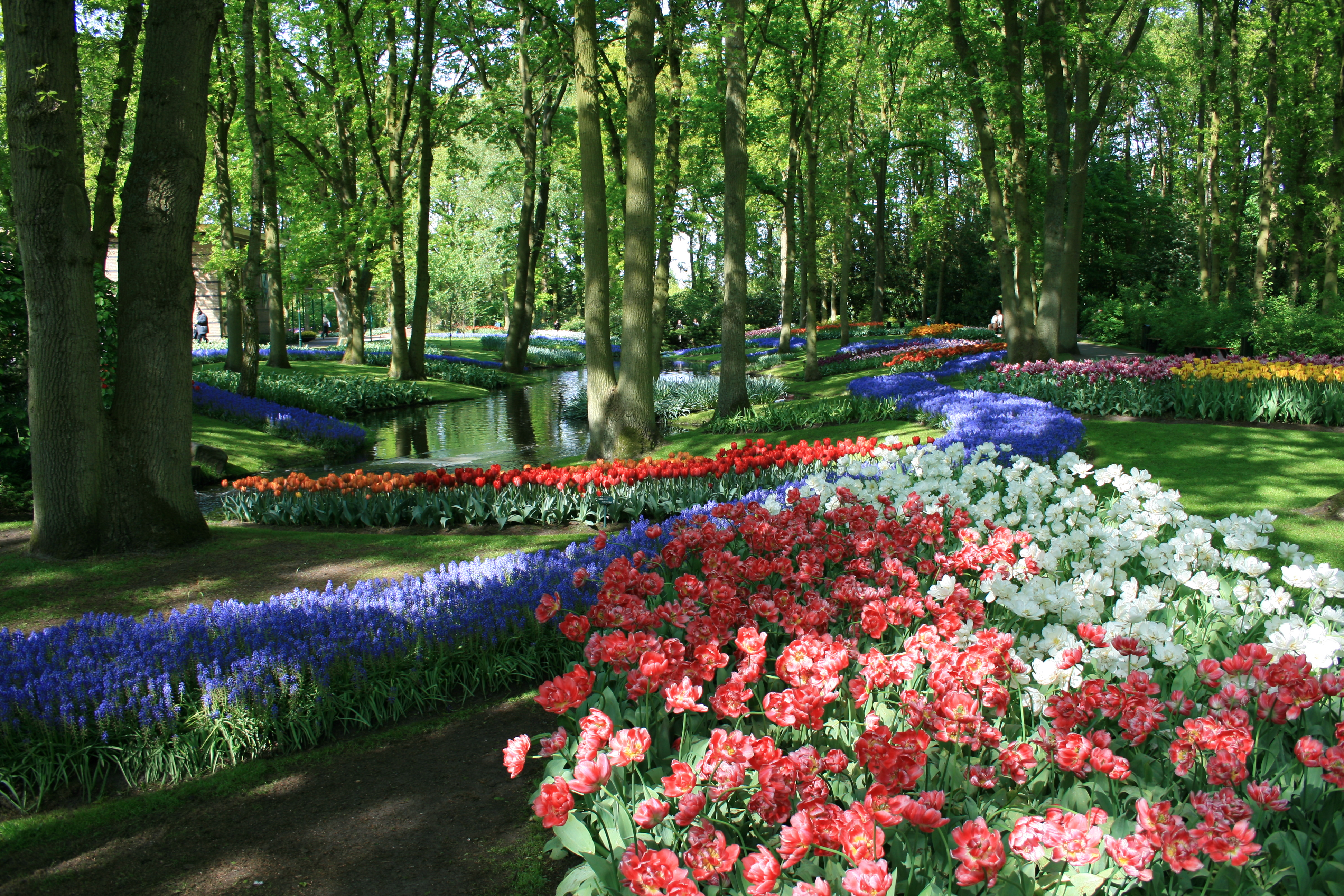 Тюльпаны в парке Кёкенхоф, Голладния